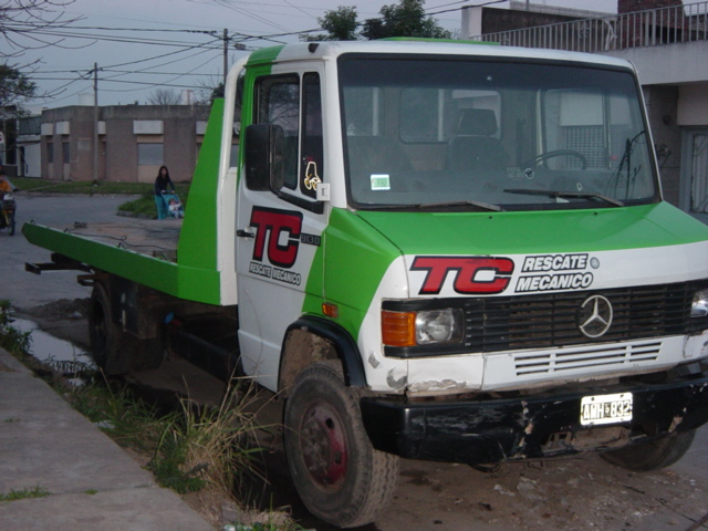 Grúa tipo camilla